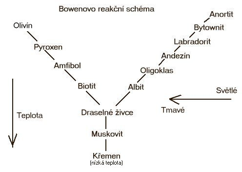 Schématické vyjádření Bowenova reakčního scháma, které určuje posloupnost krystalizace vzhledem k teplotě.